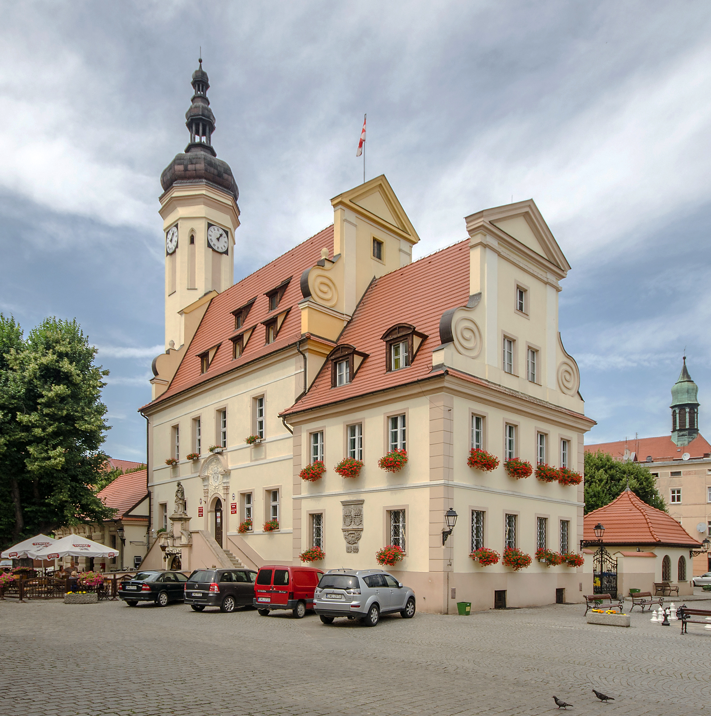 Wołów, ratusz, XV